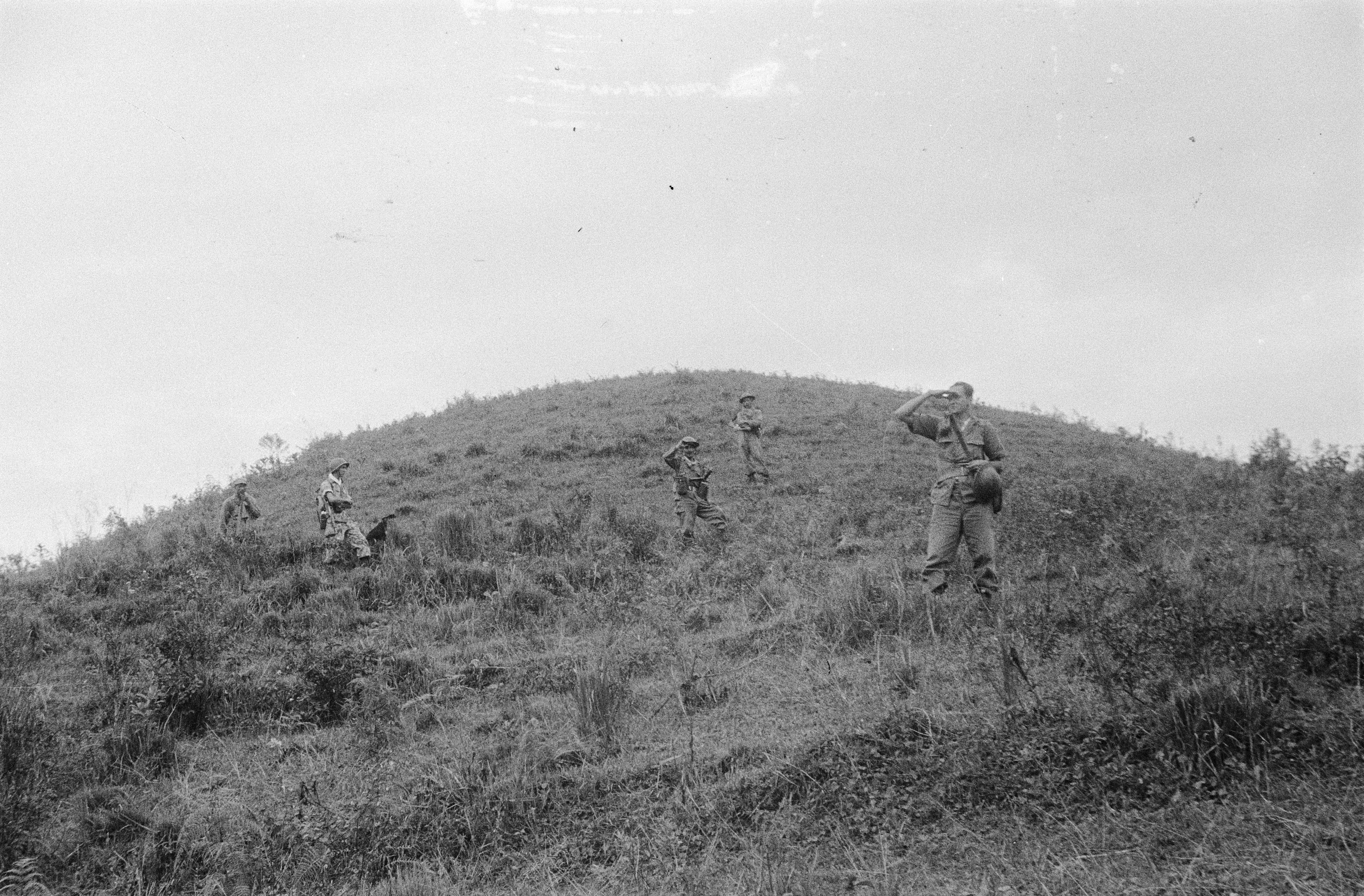 Collectie / Archief : Fotocollectie Dienst voor Legercontacten Indonesië Reportage / Serie : [DLC] Republiek: Sidamanik en Bah Bonton (theefabriek) ten oosten van Siantar Beschrijving : Sidamanik (Sumatra's Oostkust) Van een verhoging in het terrein, een zogenaamde tjot, observeren leden van de patrouille van 3 Infanterie VI de omgeving Annotatie : Links met verrrekijker staat luitenant Bakker Datum : 27 oktober 1947 Locatie : Indonesië, Nederlands-Indië, Sumatra Fotograaf : Huisman, B. / DLC Auteursrechthebbende : Nationaal Archief Materiaalsoort : Negatief (zwart/wit) Nummer archiefinventaris : bekijk toegang 2.24.04.02 Bestanddeelnummer : 3676